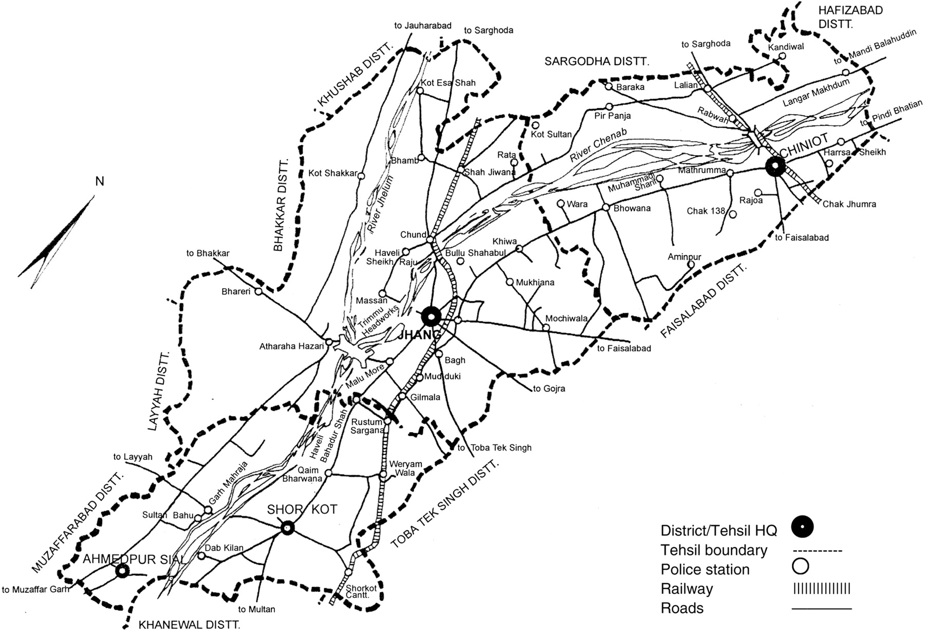 پنجابی: ضلع جھنگ دا نقشہ